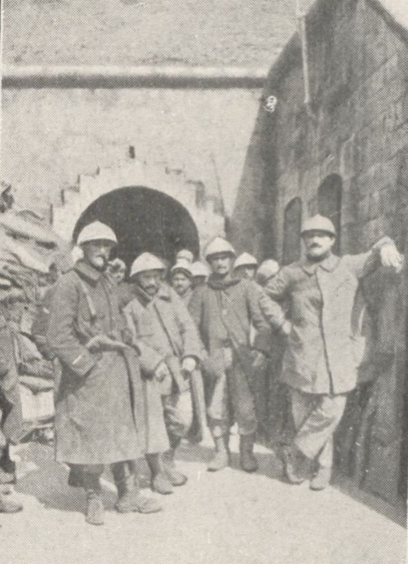 Devant Douaumont (avril 1916). Historique du 18e bataillon de chasseurs à pied